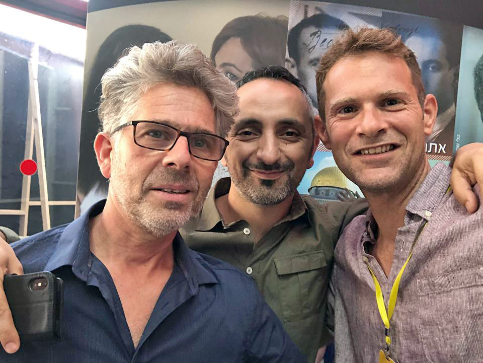 Regisseur Yair Lev, Produzent David Deri und Guy Lavie vom Sender yes docu beim docaviv festival 2018.